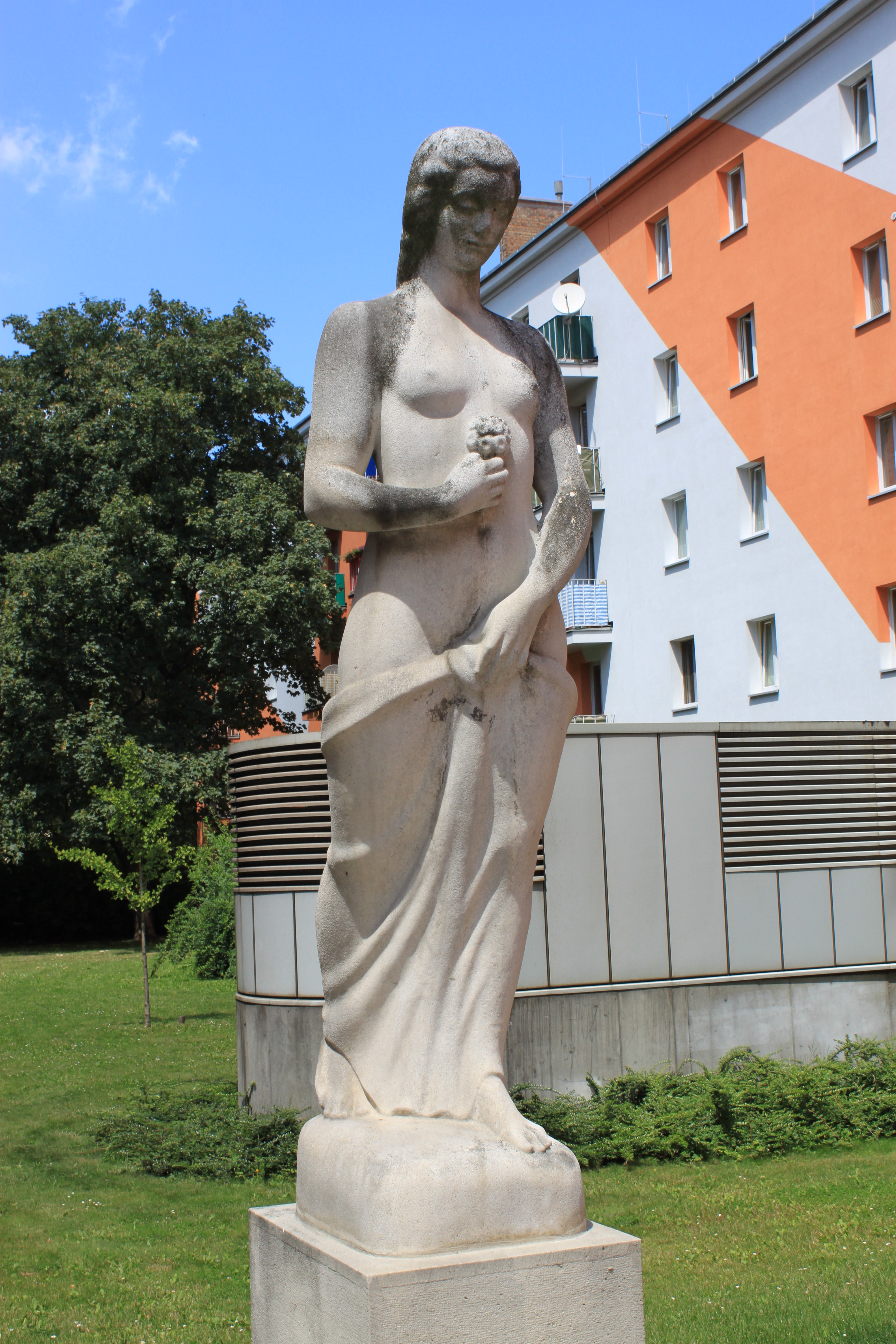 Figur bei Zippererstraße 20-22, 1110 Wien